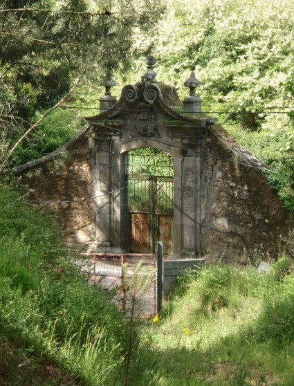 Portal da Quinta do Casalinho, no Lugar de Arnelas, Freguesia de Olival - Vila Nova de Gaia